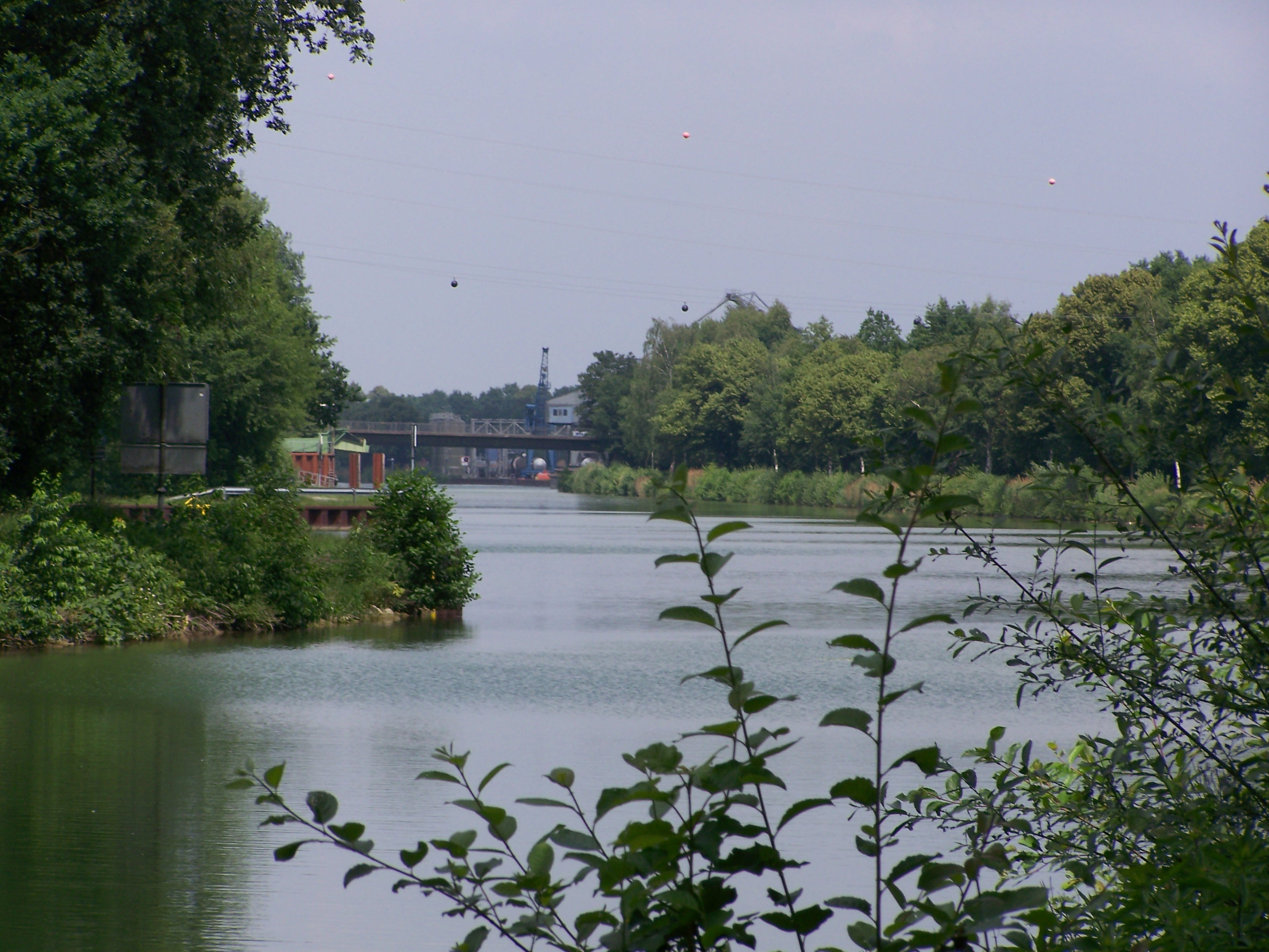 Blick in Richtung Kanalhafen Uffeln